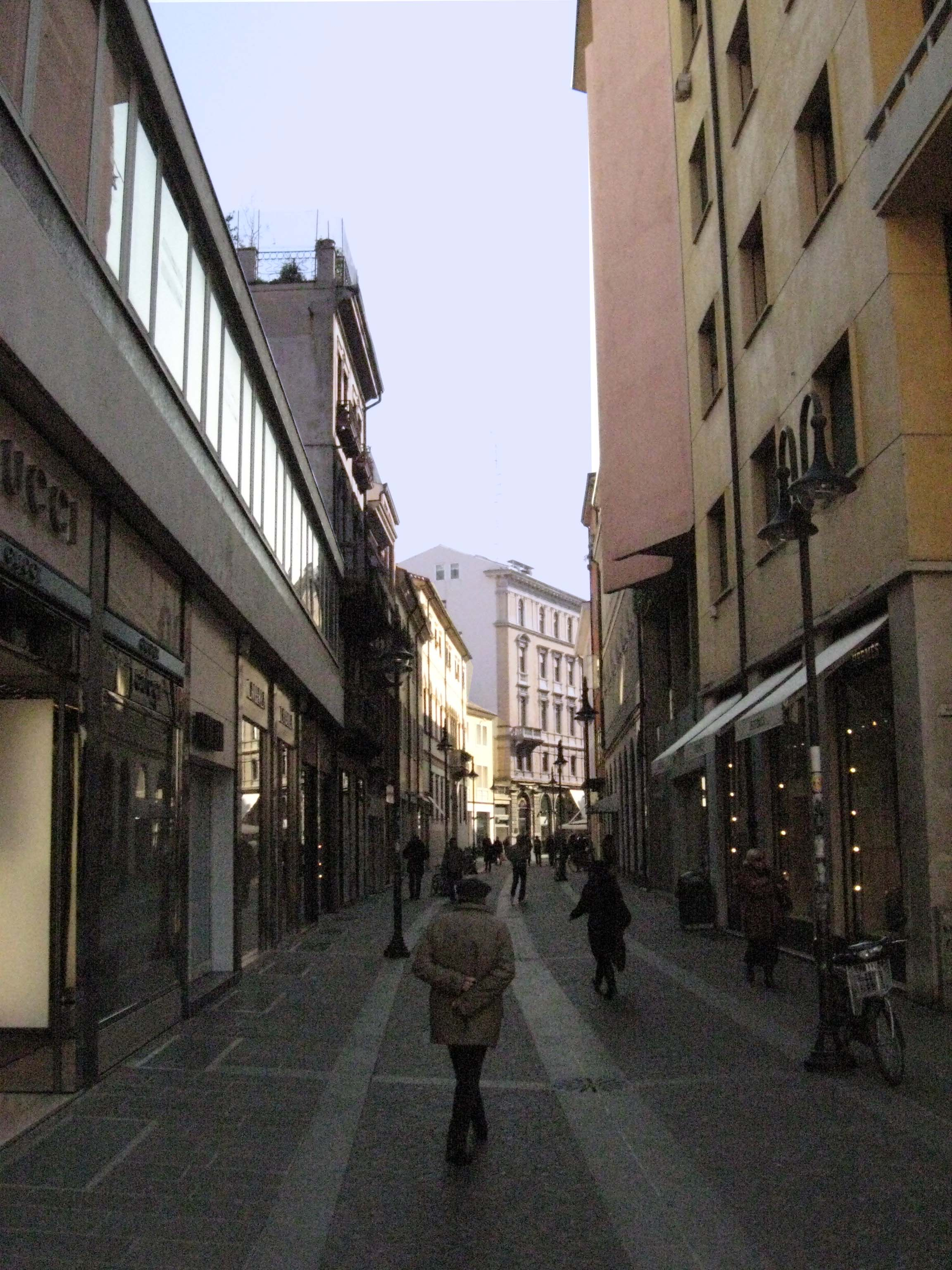 Via San Fermo